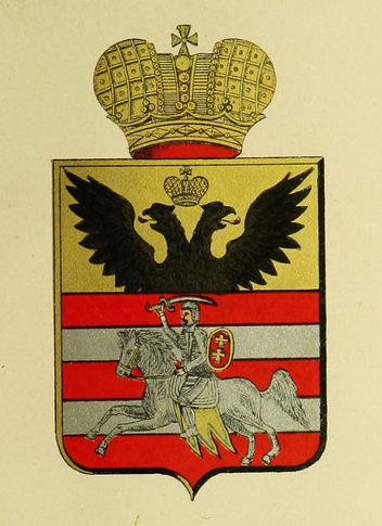 Беларуская (тарашкевіца): Віцебск (Viciebsk). Герб места з Пагоняй (Pahonia)